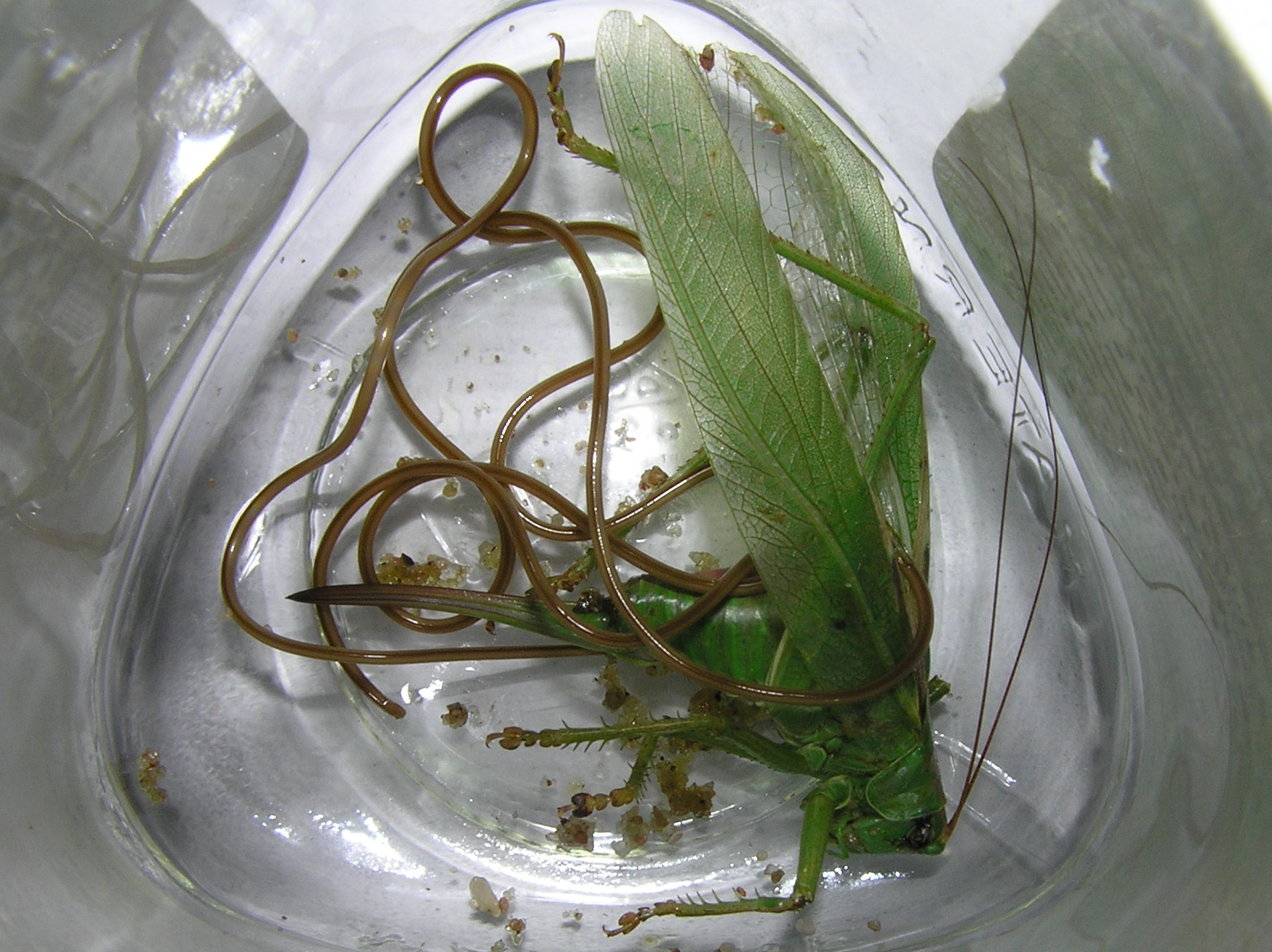 Mermis nigrescens on Tettigonia viridissima; Białowieża, Polska